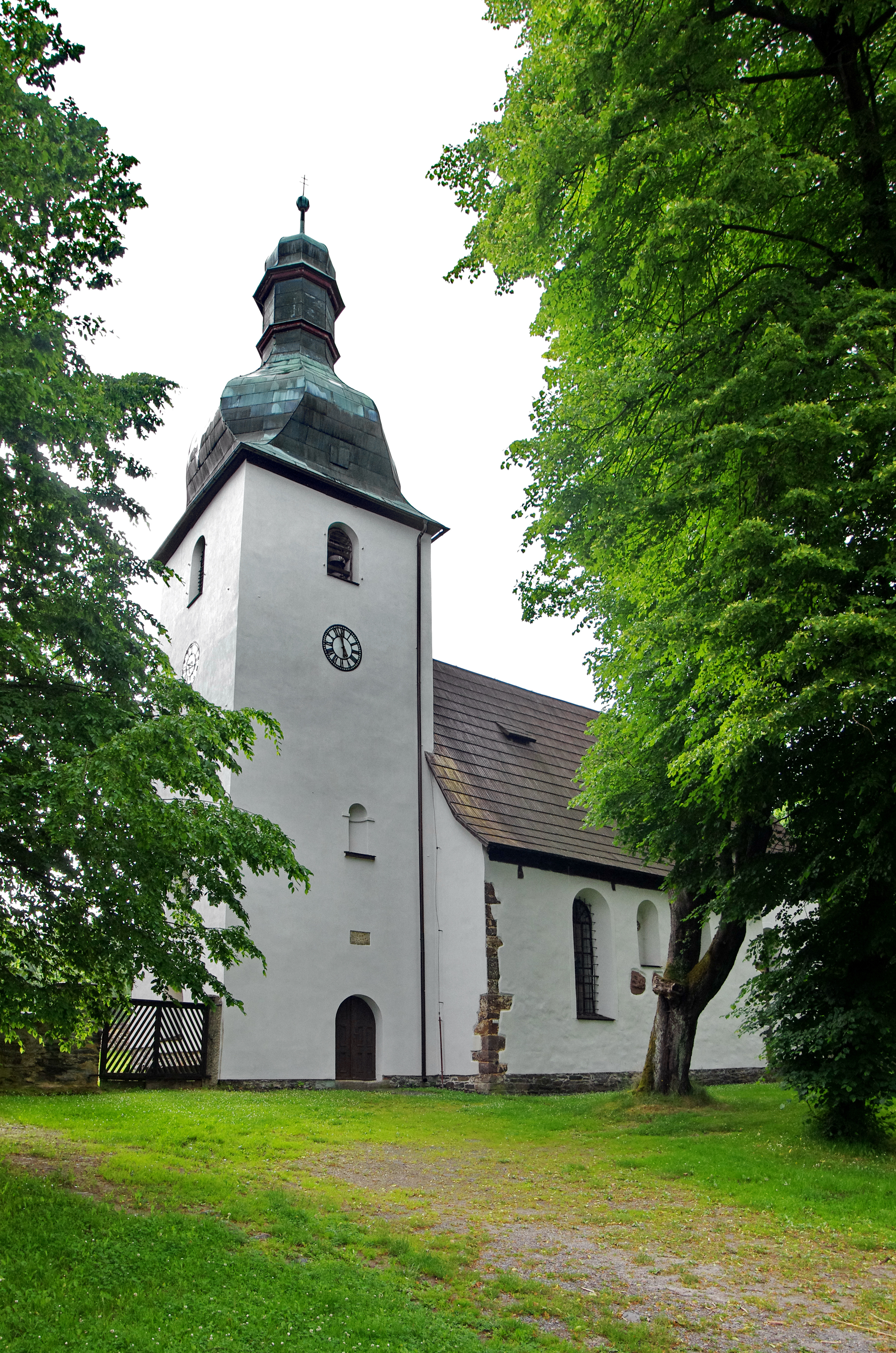 Kostel svatého Jiljí v Kostelní, části obce Kraslice